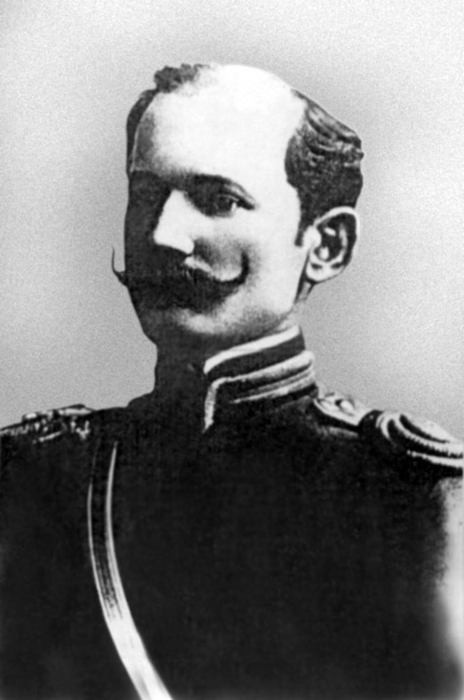 Српски (ћирилица): Андрија Бакић